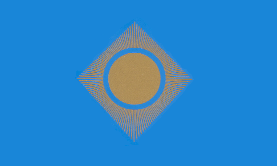 Bandera de Iruña de Oca, en la provincia de Álava (España)